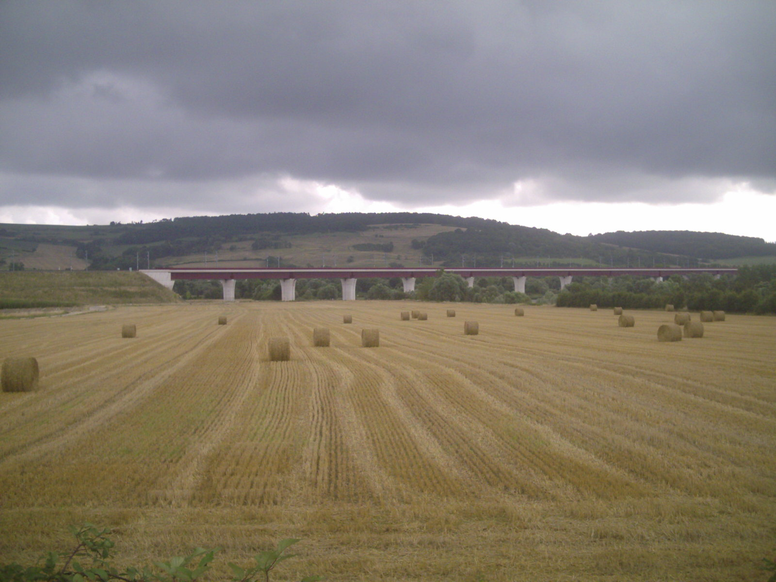 Viaduc de la Moselle, Viaduc de Vandières au dessus de la Moselle, photographie depuis le canal